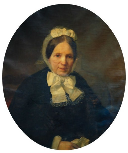 Софья Васильевна Олферьева, урож. Обухова